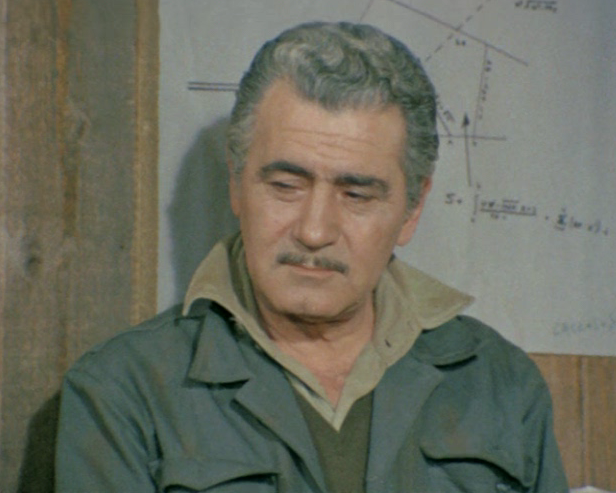 Ignazio Balsamo in a scene of the film Il ragazzo che sorride